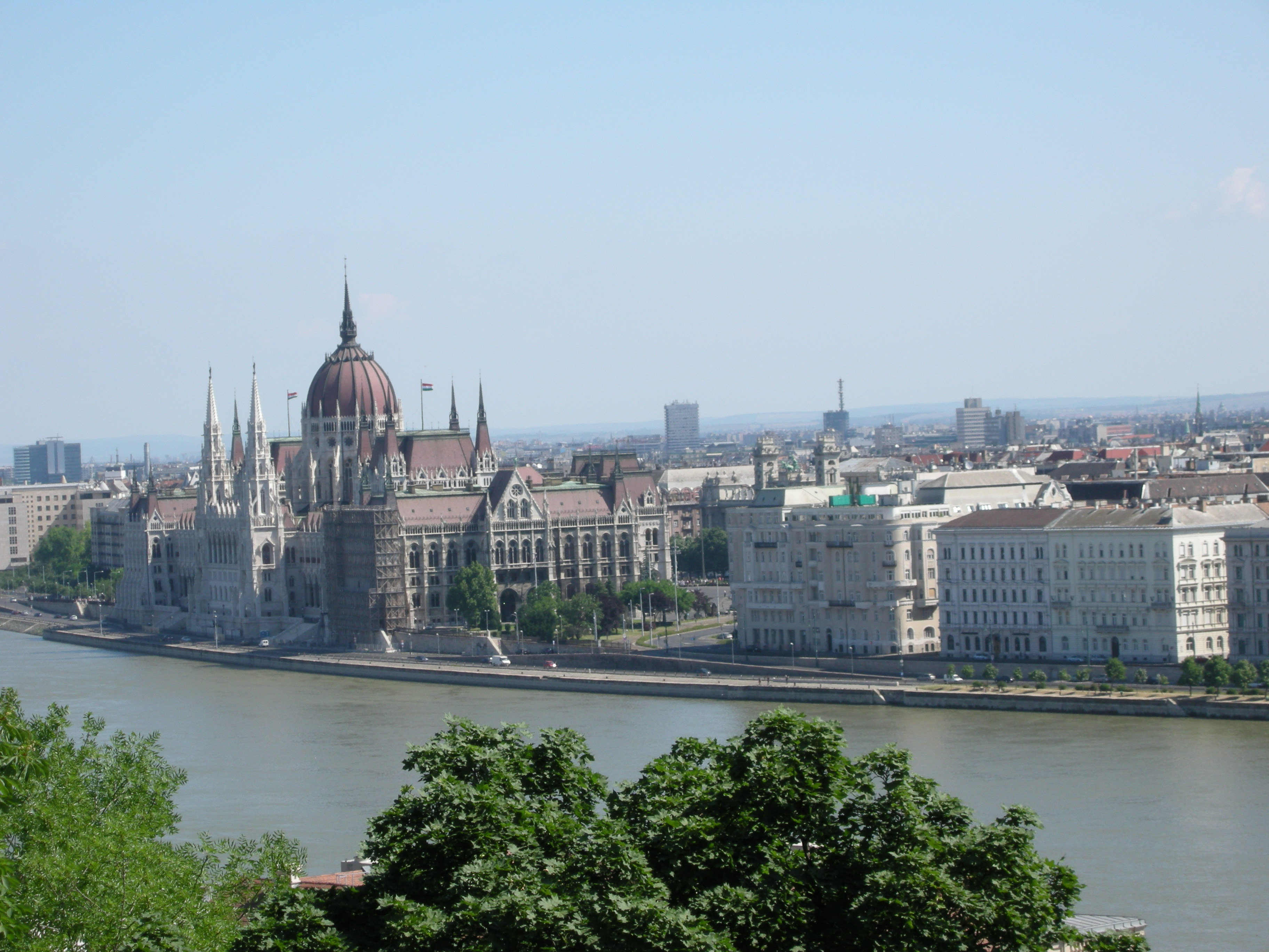 Budapest